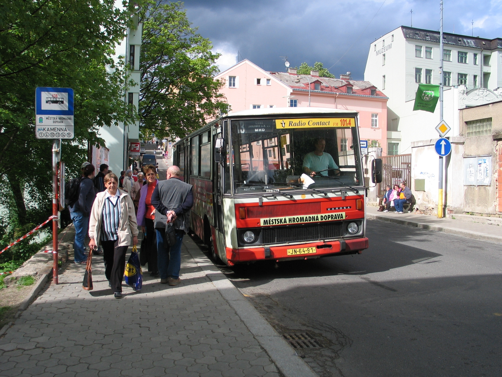 1989 Karosa B 731, Jablonec nad Nisou